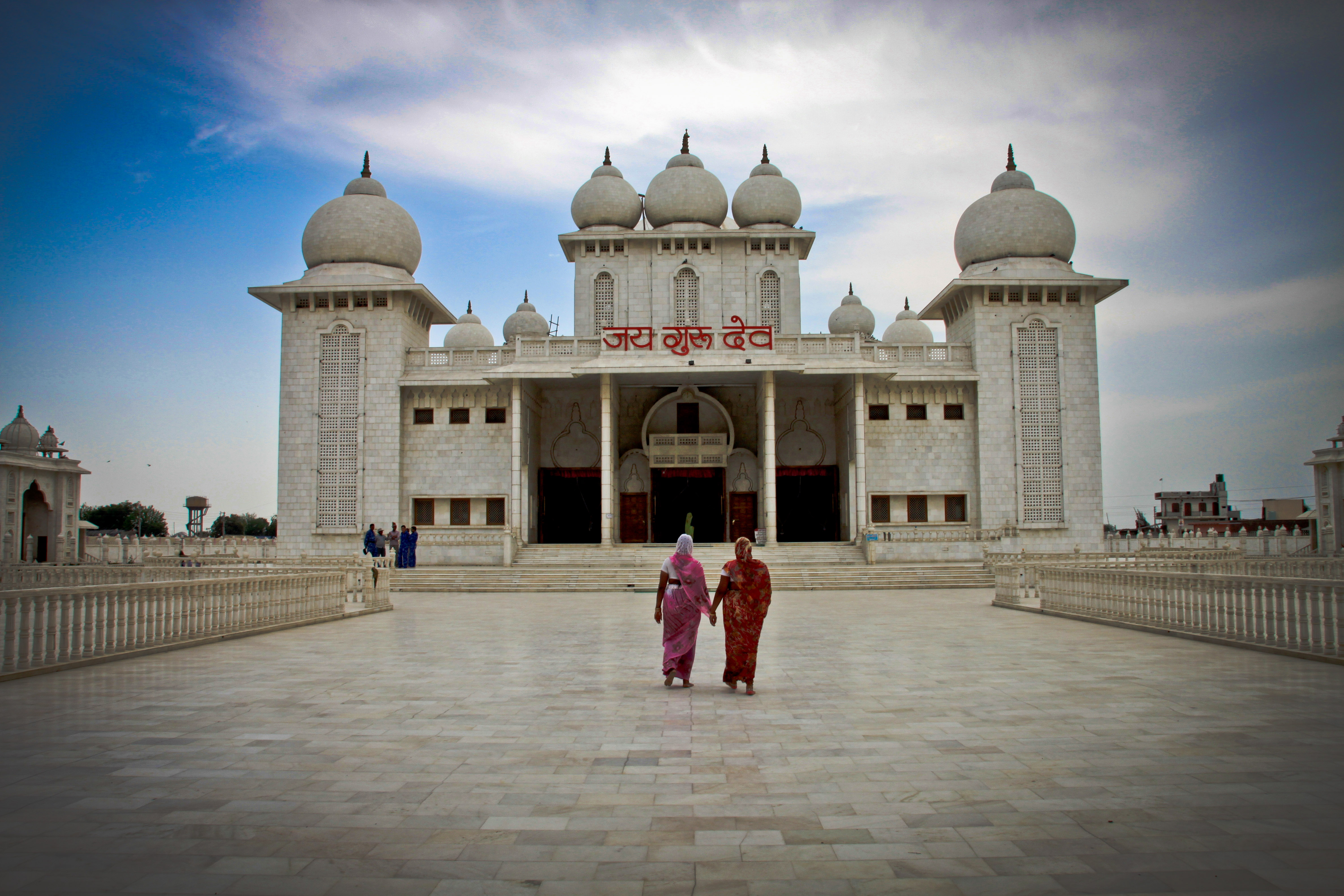 Satguru Temple